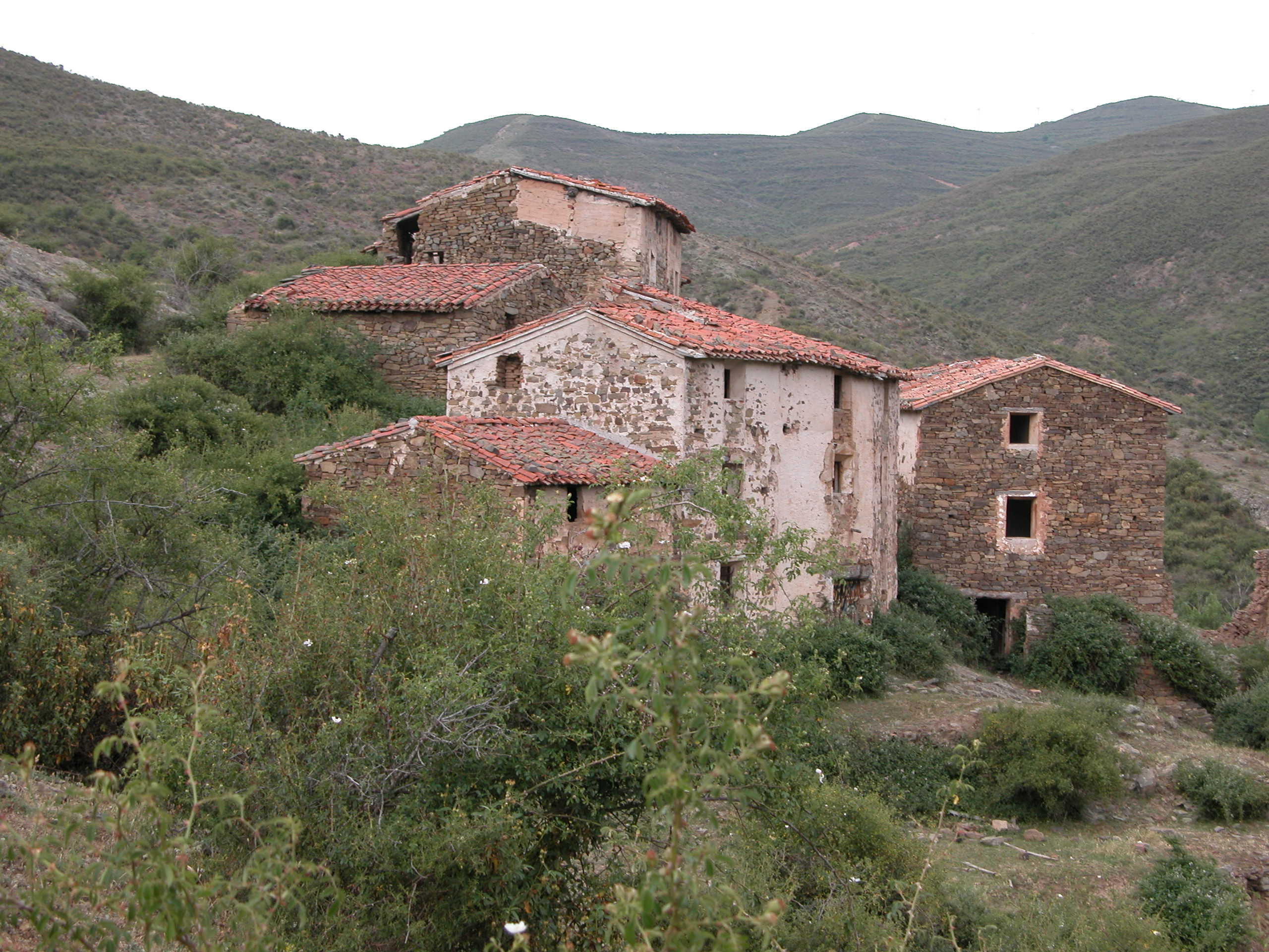 Valtrujal, despoblado de Robres del Castillo (La Rioja, España).